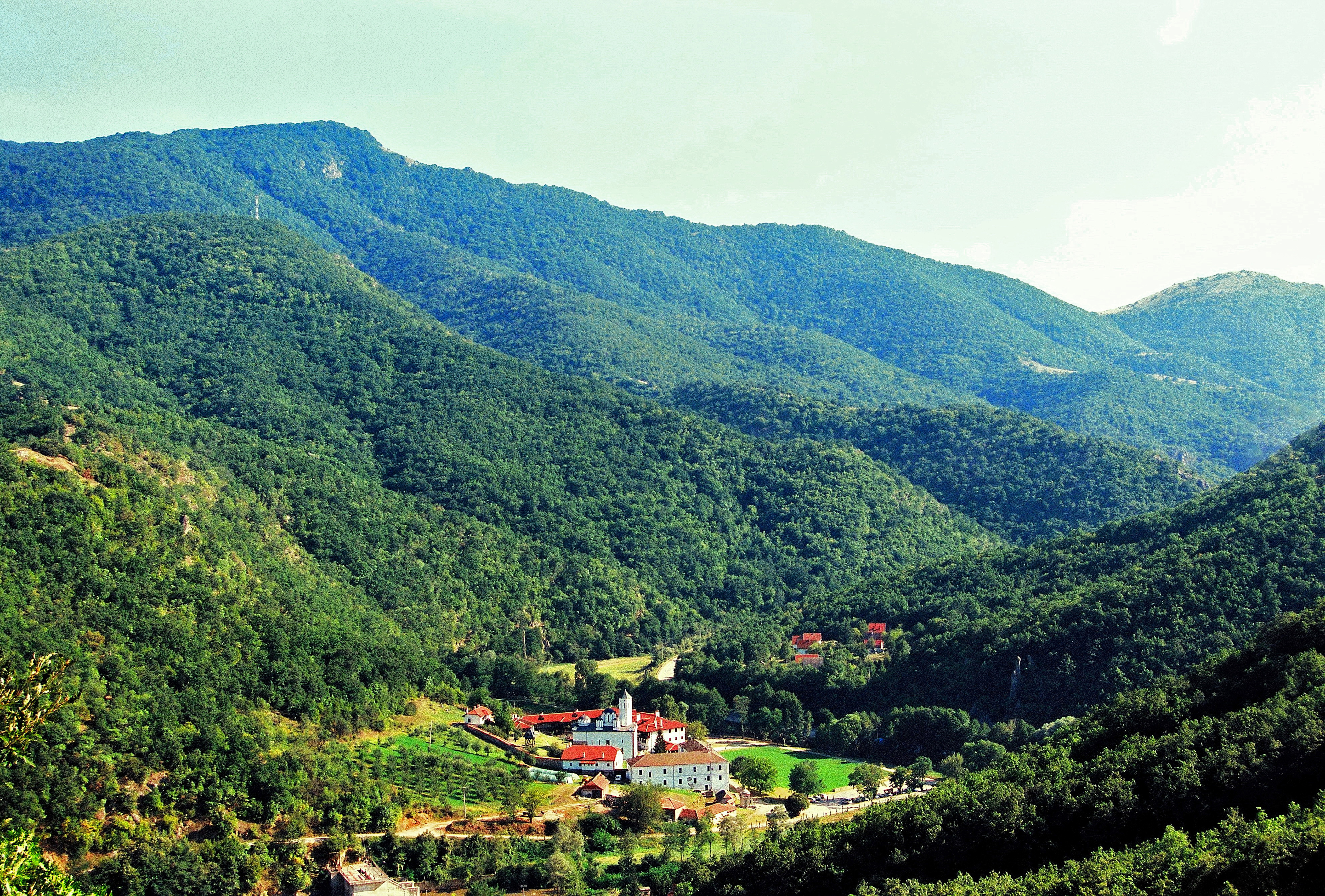 Srpski (latinica): Srpski manastir Sveti Prohor Pčinjski, osnovan u 11. veku. Nalazi se na obroncima planine Kozjak na levoj obali reke Pcinje.